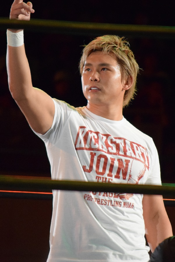 2016年8月6日 大阪府立体育会館 「G1 CLIMAX 26」 中嶋勝彦